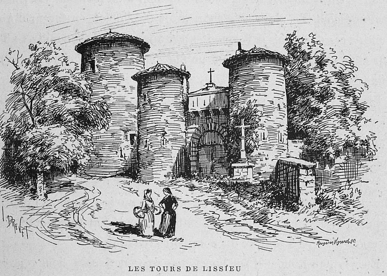 Aux environs de Lyon / Monsieur Josse ; préface de M. Coste-Labaume ; édition illustrée de 250 dessins de J. Drevet.